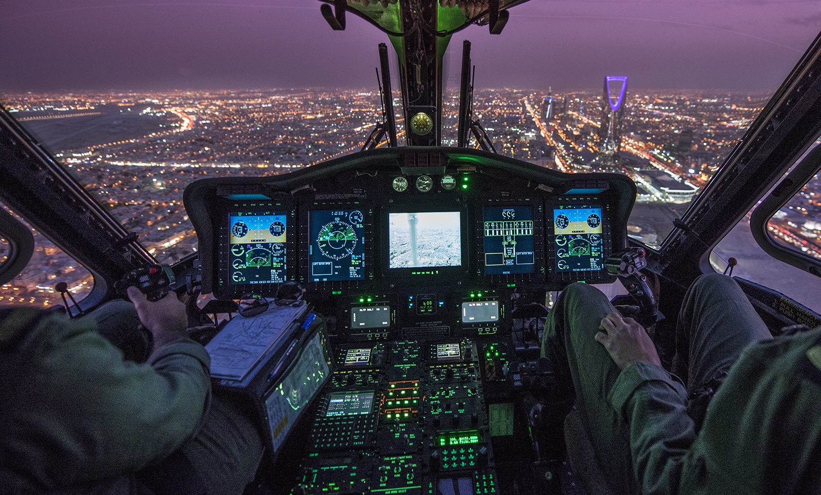 Sikorsky S-92 inflight over Riyadh at night